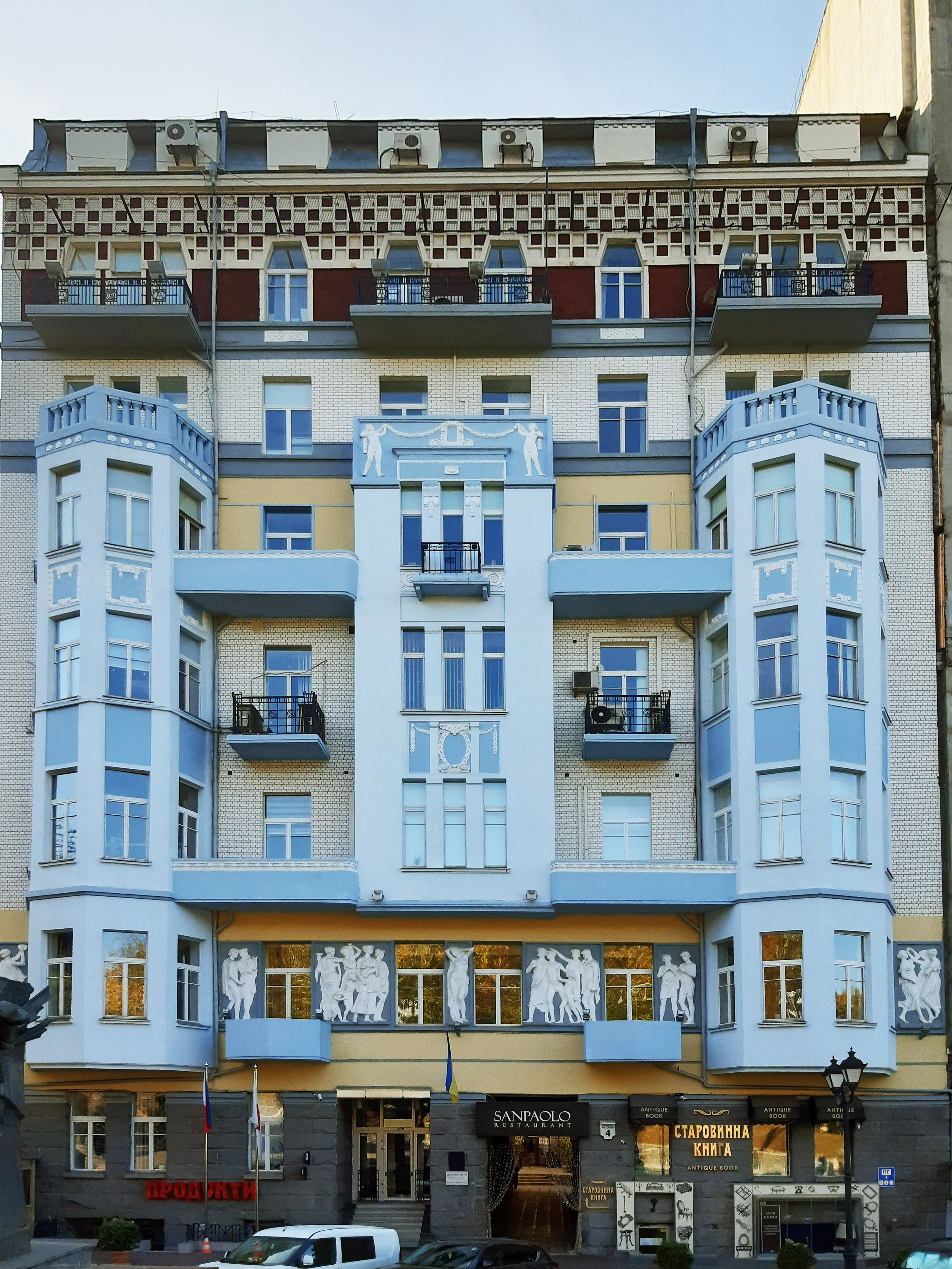 Будинок прибутковий, Київ, Музейний пров., 4